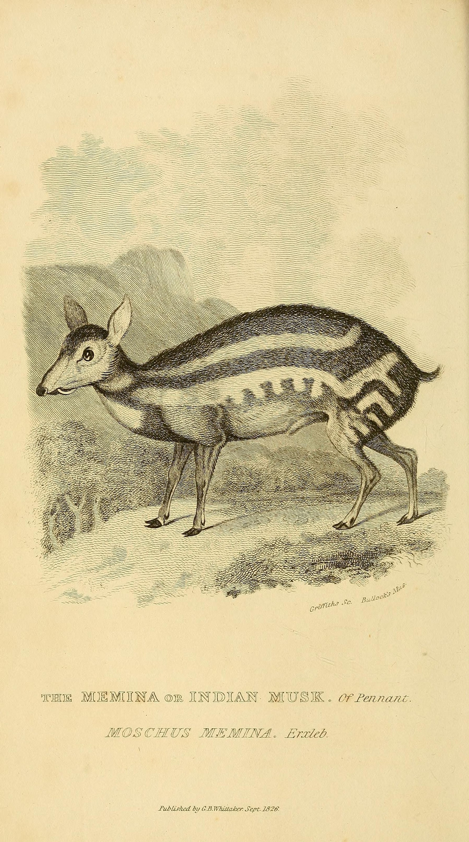 the MfEMEWA ©m OTB2AH- MUSIK. Ofltauiam MOSCMUS JWMMIiYJL, Erxleb. J~ubUshalbiiGB.Wluitalcer.Sept.J62e.